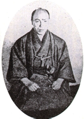 幕末の土佐藩士・吉田東洋の写真